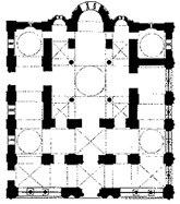 dessin Église des saints apotres salonique.